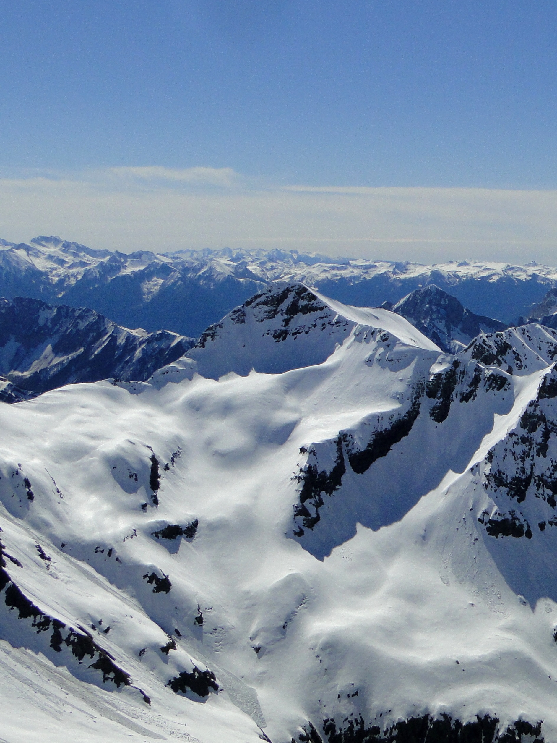 Pizzo Tornello, Prealpi Orobie, Val di Scalve (BG)